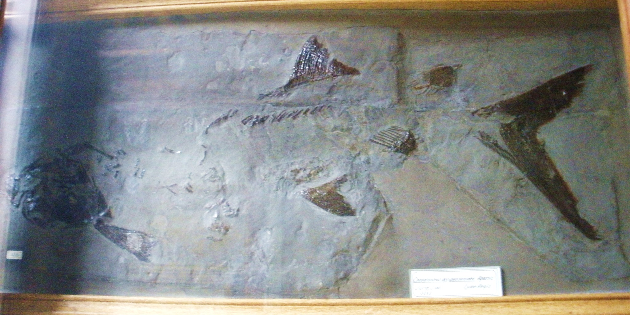 Fossil of Chondrosteus, an extinct fish- Took the photo at Teylers Museum, Haarlem